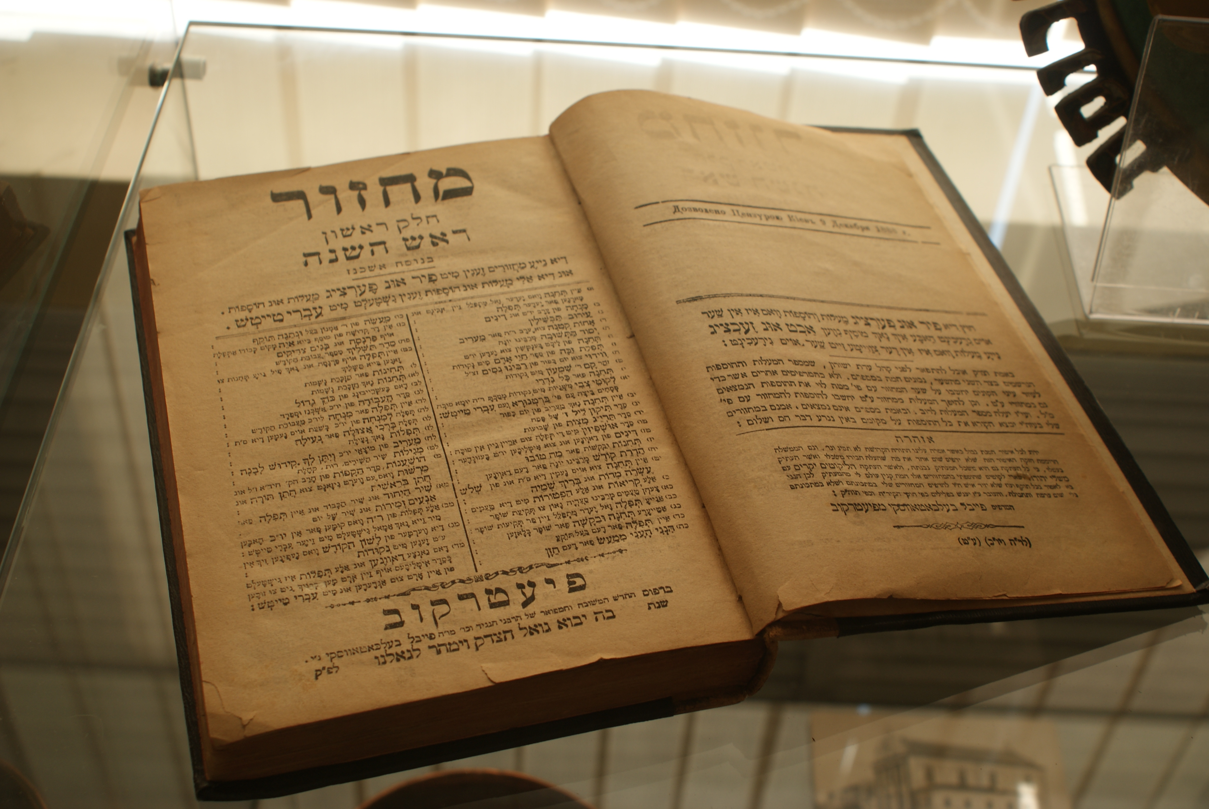 Макзор. Святочныя малітвы. Частка 1. Петрыкаў, 1888 г. З музея гісторыі і культуры яўрэяў Беларусі.